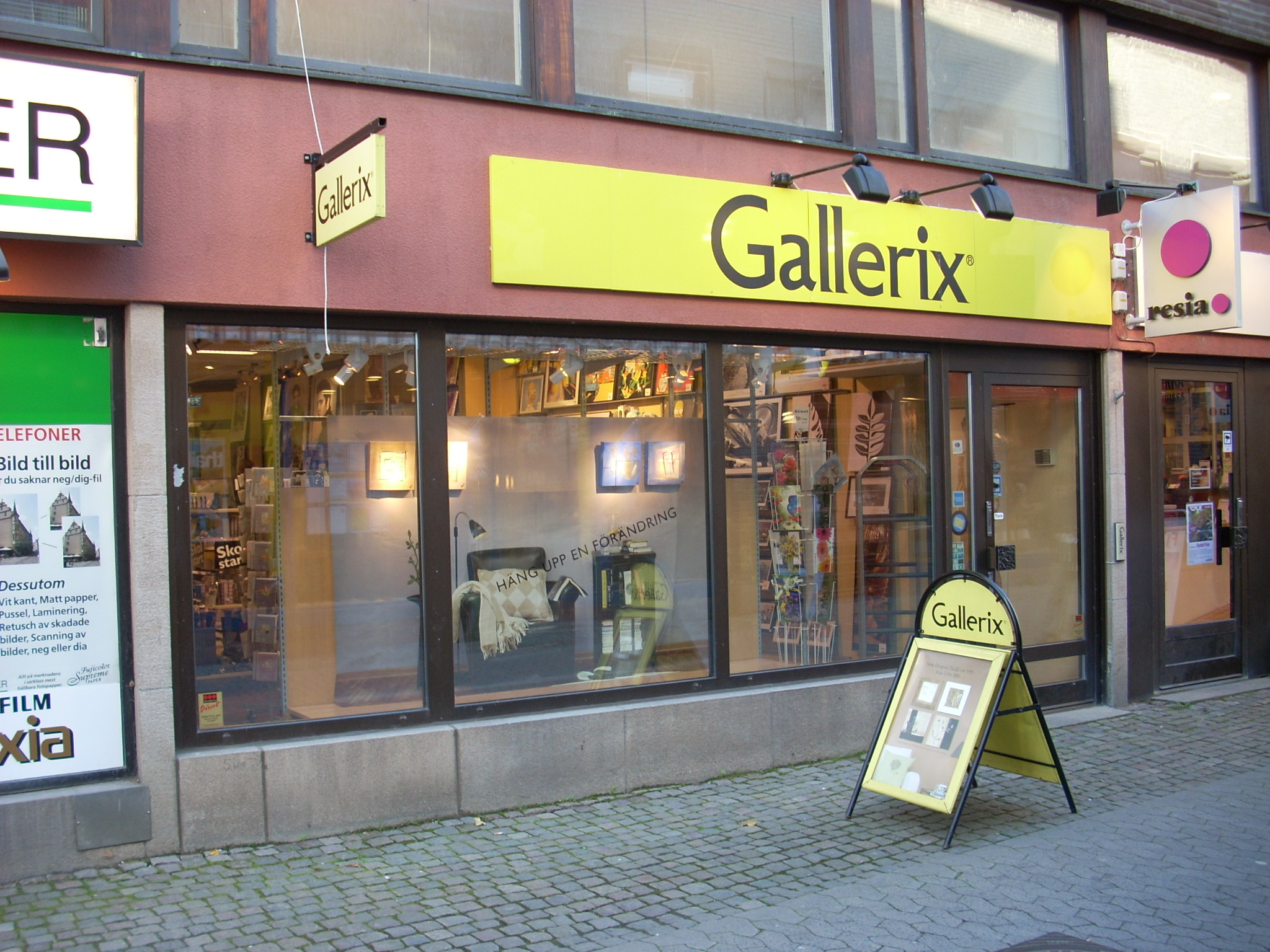 Gallerix på Smedjegatan i Jönköping